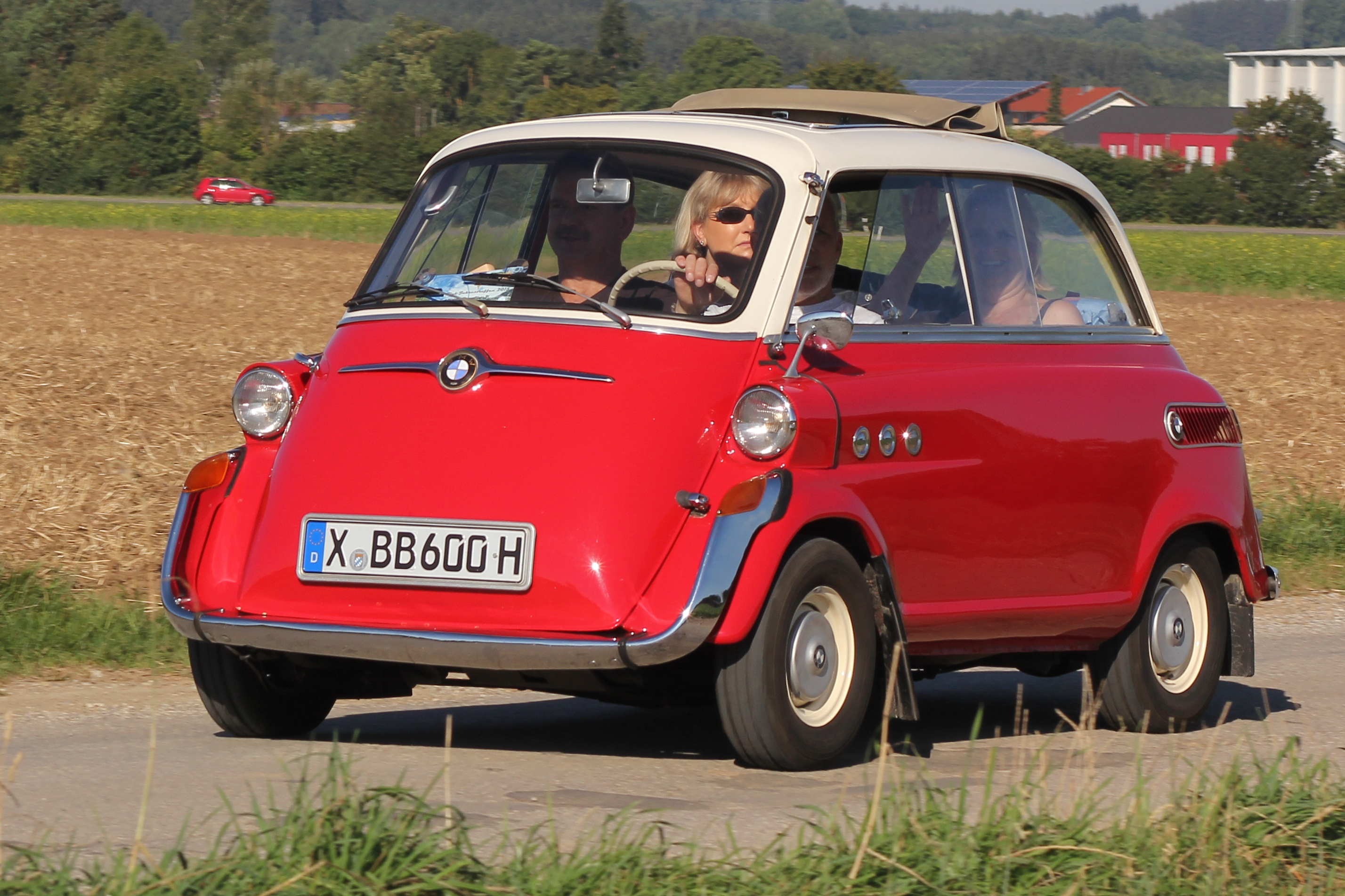 BMW BMW 600 beim BMW-Isetta-Treffen in Bad Wörishofen (engerer Ausschnitt des gleichen Fotos). Das Kennzeichen des Fahrzeugs ist verfälscht.